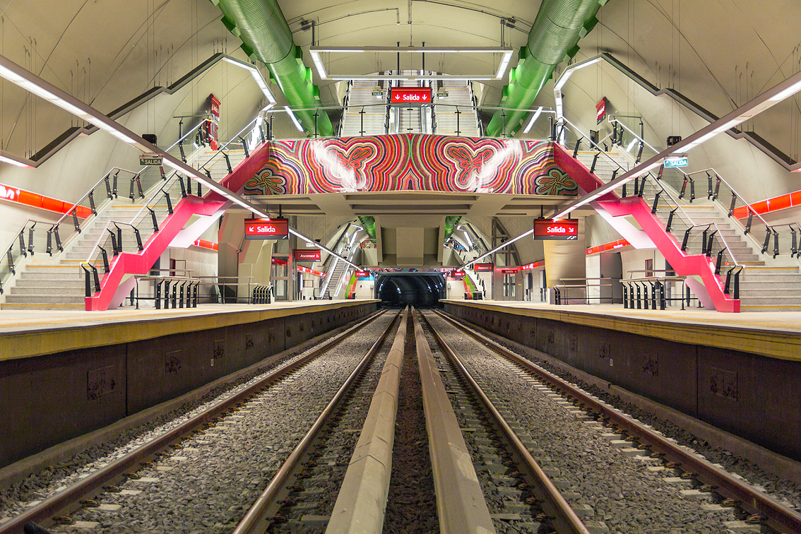 Subte de Buenos Aires